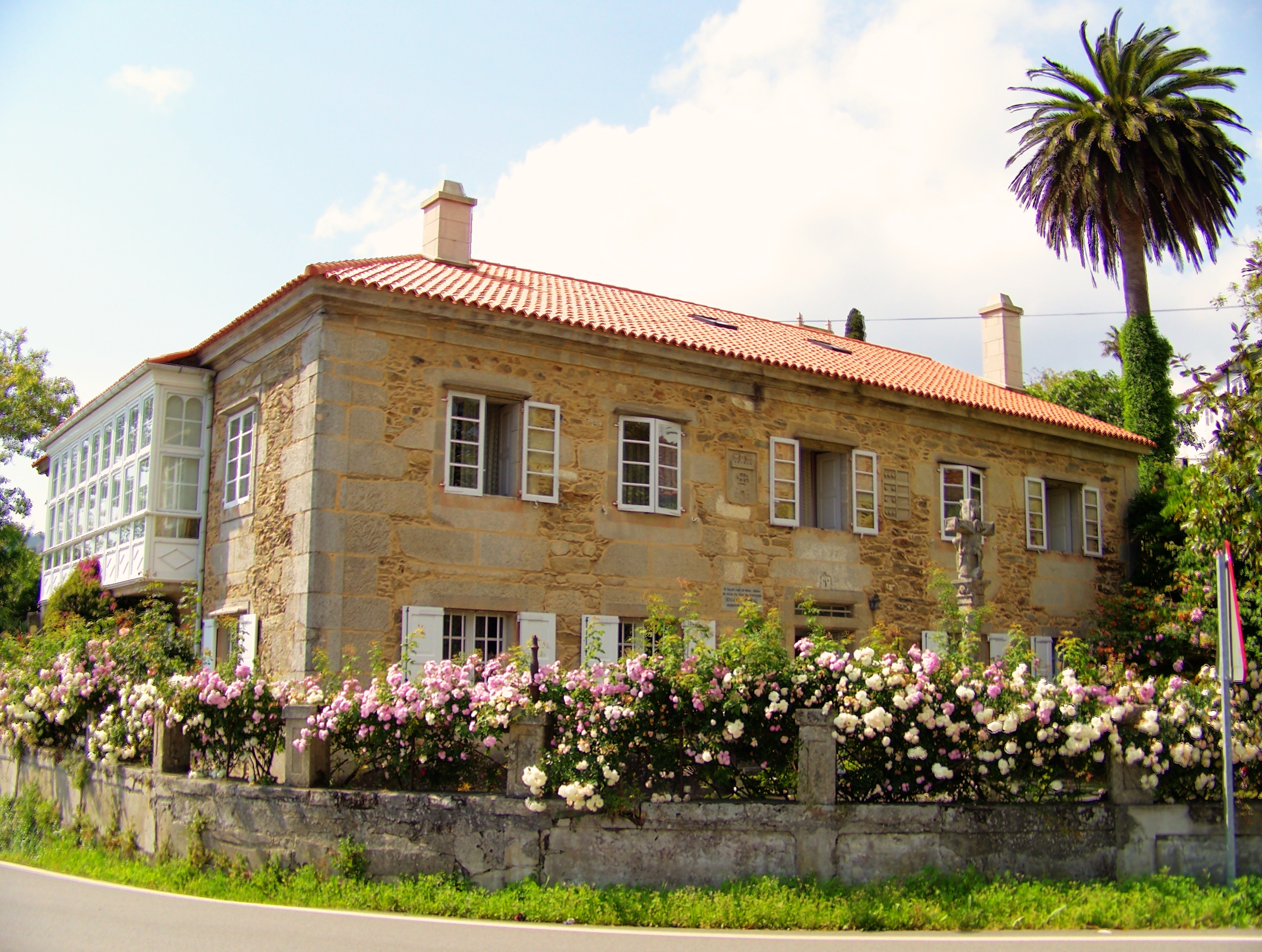 Pazo Pondal - PontecesoEduardo Pondal nació en esta casa en febrero de 1835. Su poema Os pinos es la letra del himno gallego.